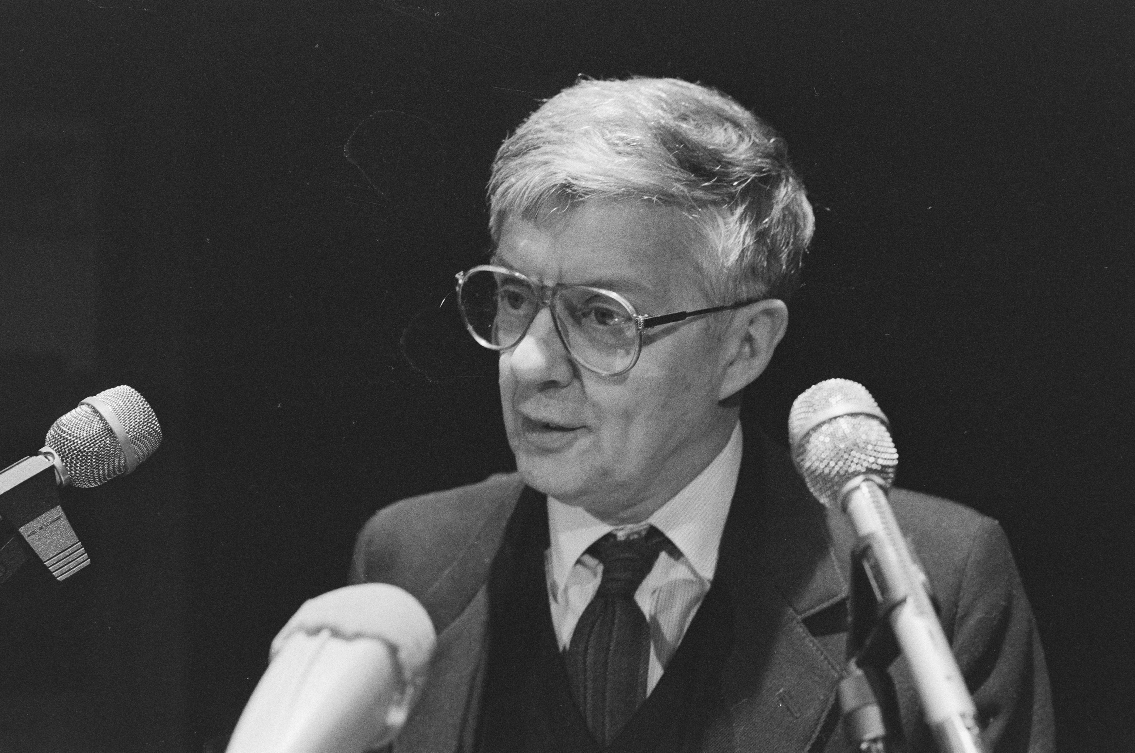 Collectie / Archief : Fotocollectie Anefo Reportage / Serie : [ onbekend ] Beschrijving : Boekenweek 1987: Rudy Kousbroek , kop Datum : 23 februari 1987 Trefwoorden : BOEKENWEKEN Fotograaf : Gerrits, Roland / Anefo Auteursrechthebbende : Nationaal Archief Materiaalsoort : Negatief (zwart/wit) Nummer archiefinventaris : bekijk toegang 2.24.01.05 Bestanddeelnummer : 933-9016